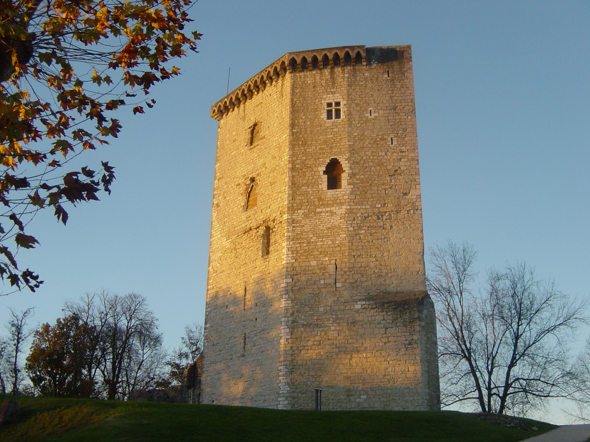 Vestige du château de Gaston Fébus, comte de Béarn au XIIIème siècle, seule la tour demeure debout. Elle abrite maintenant un musée historique et l'on peut grimper à son sommet pour jouir d'une vue magnifique sur la ville d'Orthez et ses environs. Ce musée retrace l'histoire des comtes de Béarn et en particulier du plus célèbre d'entre eux, Gaston Fébus. On a longtemps pensé que cette tour était hantée par la Dame Blanche, une prisonnière qui y fut enfermée et y mourut en ces sombres temps de rivalités politiques et amoureuses. On peut y voir une maquette du château tel qu'il se présentait du temps de sa splendeur.